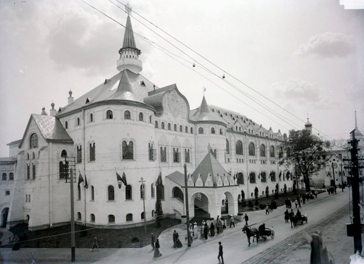 Государственный банк в Нижнем Новгороде